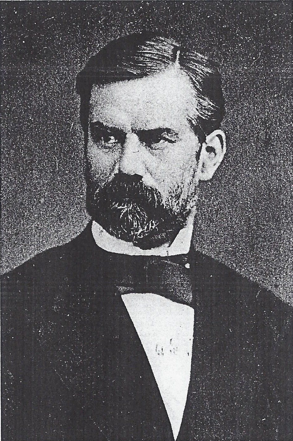 Porträtfotografie von Wilhelm Ludwig August von Schöning (1824-1902)